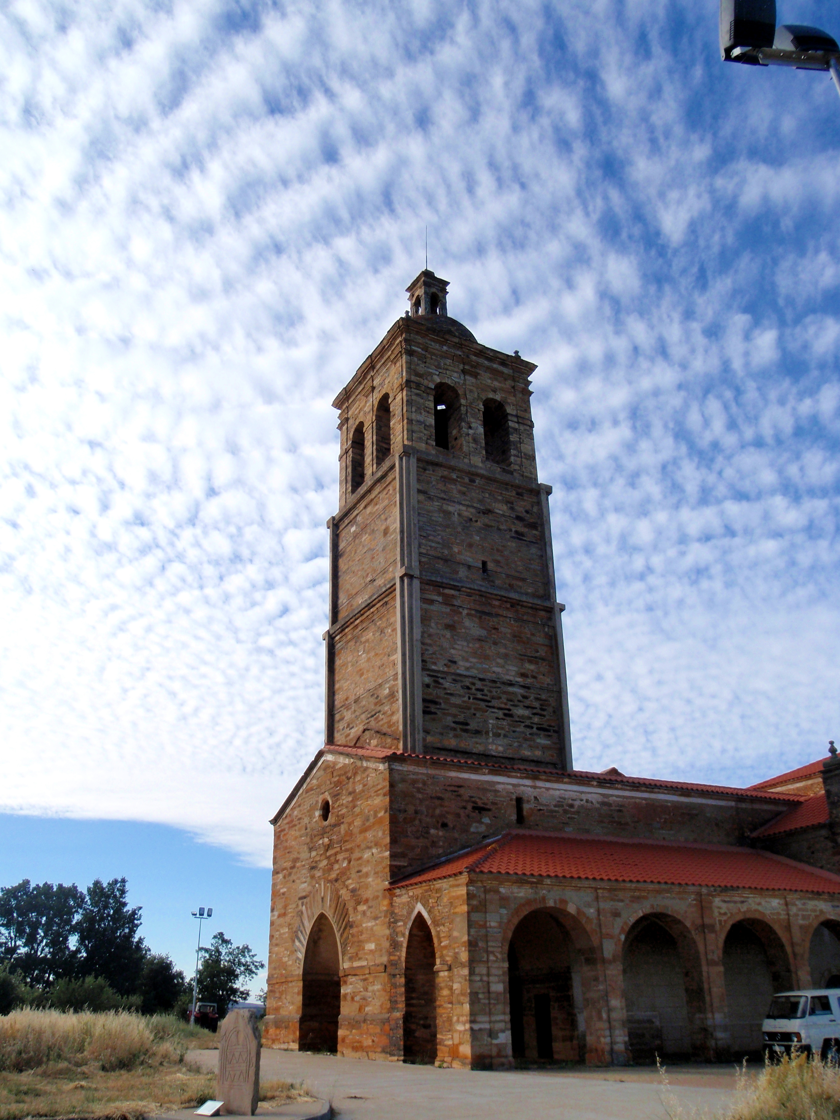 Iglesia de Tabuyo del Monte (provincia de León, España), situada en la salida Este de la población, junto a la Fuente del Cristo